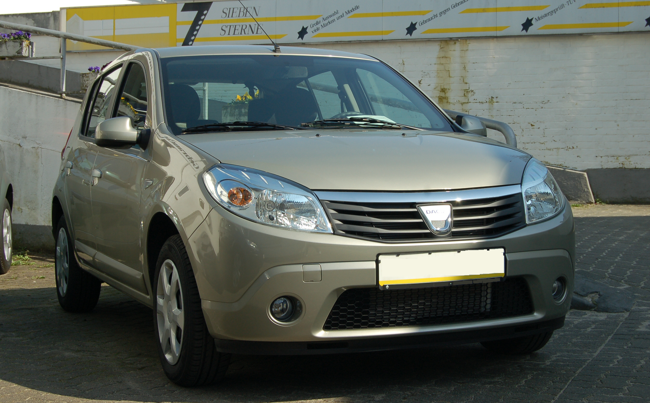 Dacia Sandero Lauréate Modell 2009 in Basalt-Grau (Metallic)